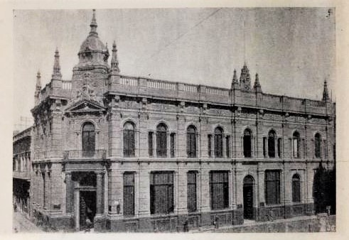 Banco Británico de la América del Sud, Calle de la Piedad 400, barrio de San Nicolás, Buenos Aires.